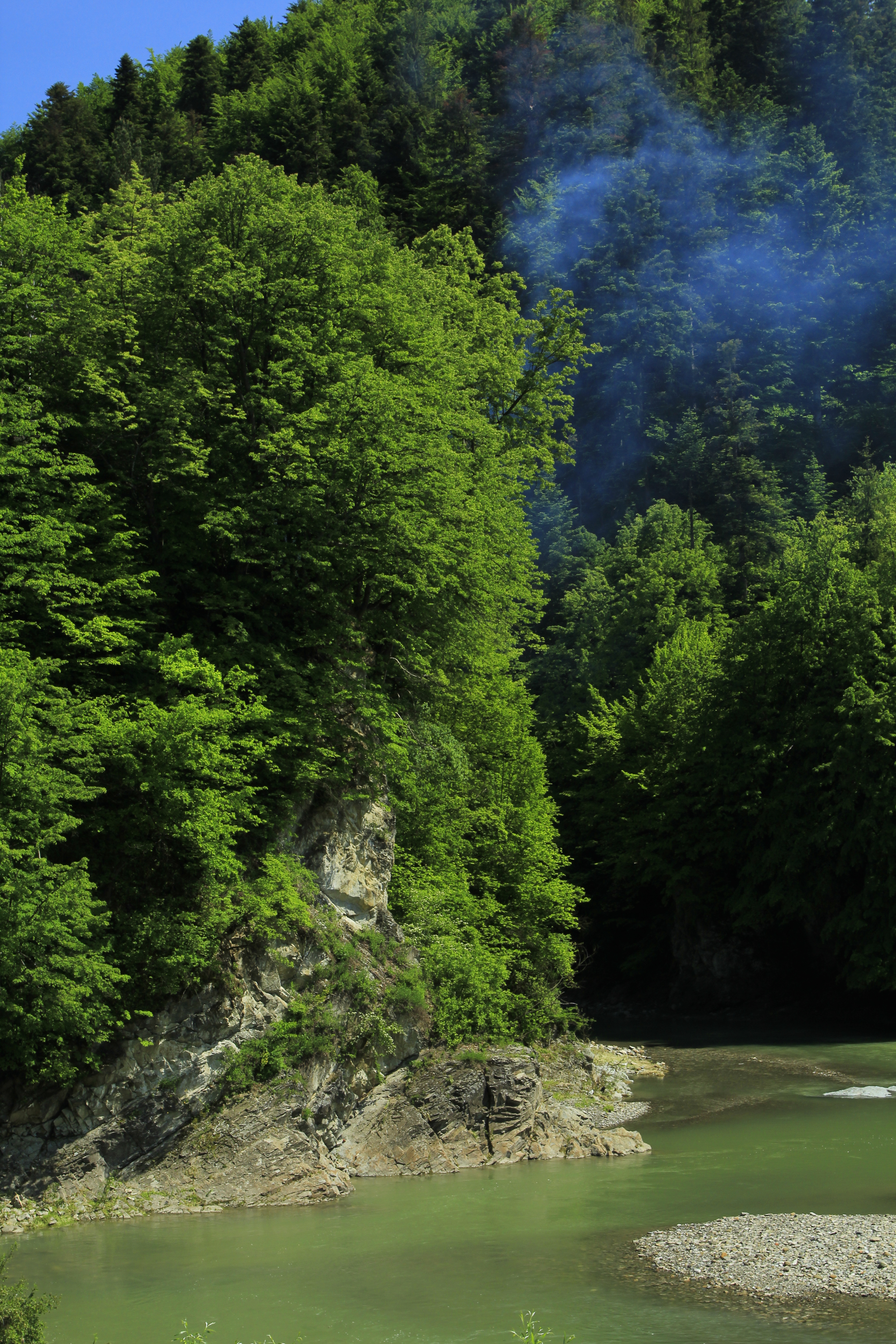 «Пістинські сланці», Косівський район с. Пістинь